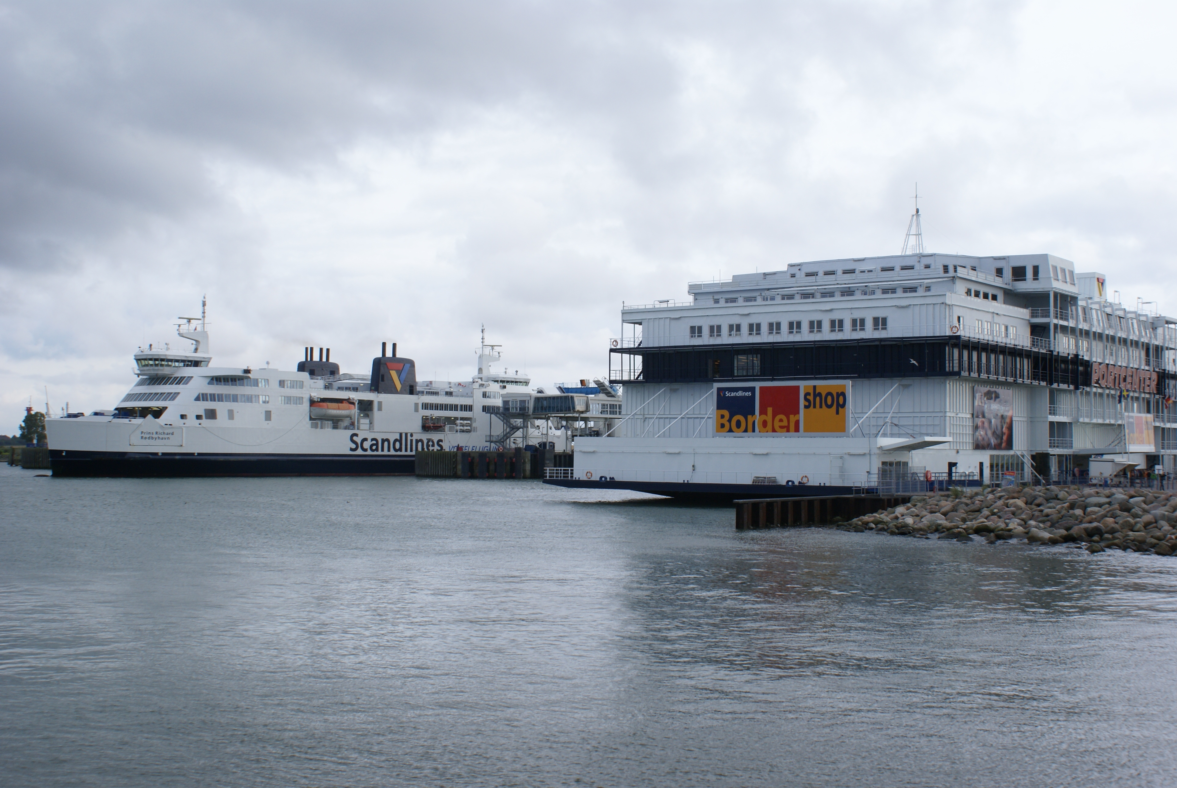 Border Shop und Fähre Prins Richard im Hafen von Puttgarden im Juli 2007 IMO Number: 9144419 MMSI Number: 219000429 Callsign: OZLB2 Length: 140 m Beam: 24 m